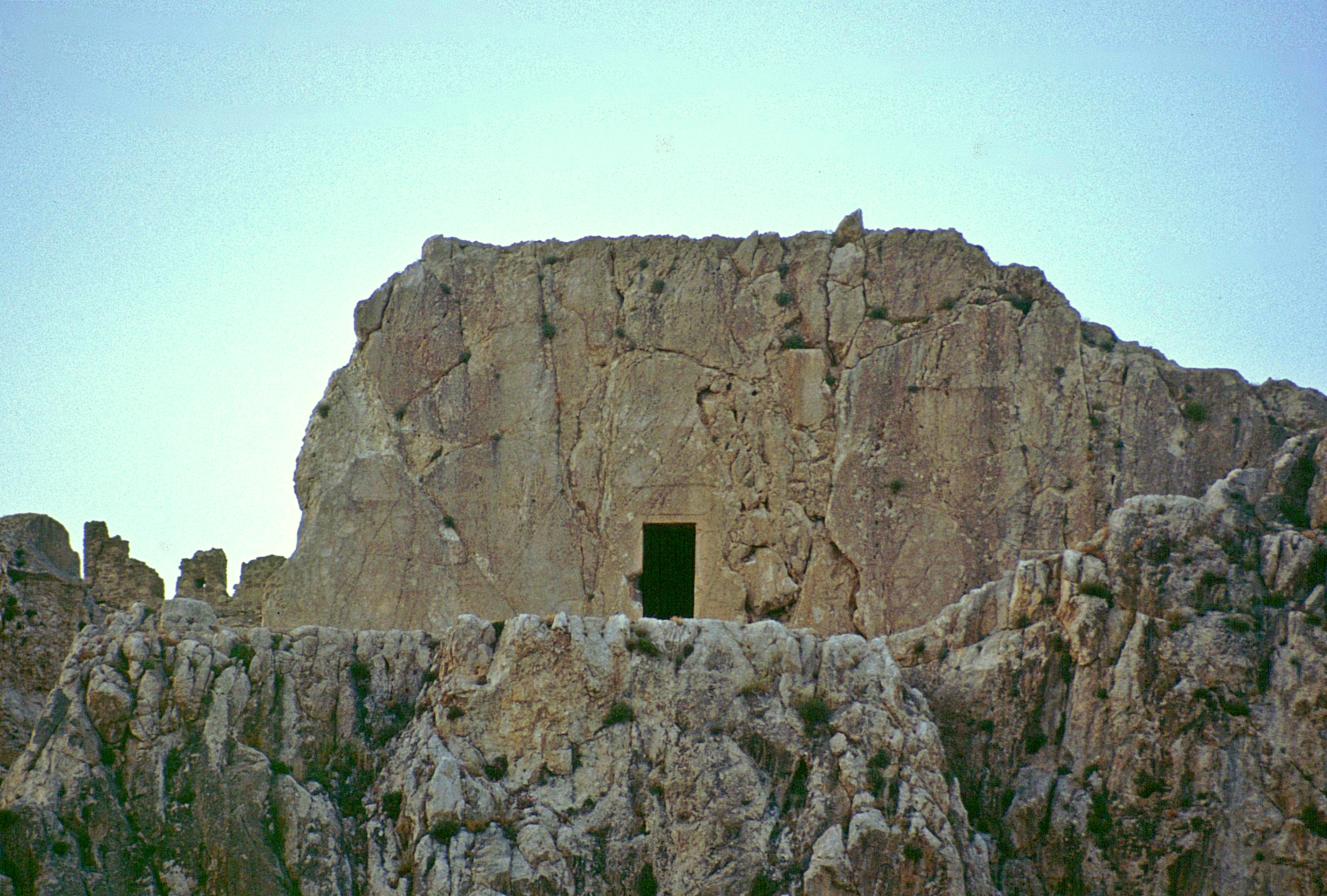 Van Kale, Tušpa